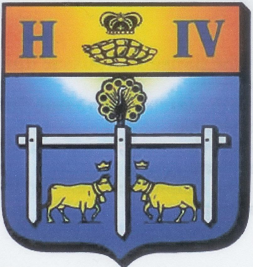 Armoirie Pau.